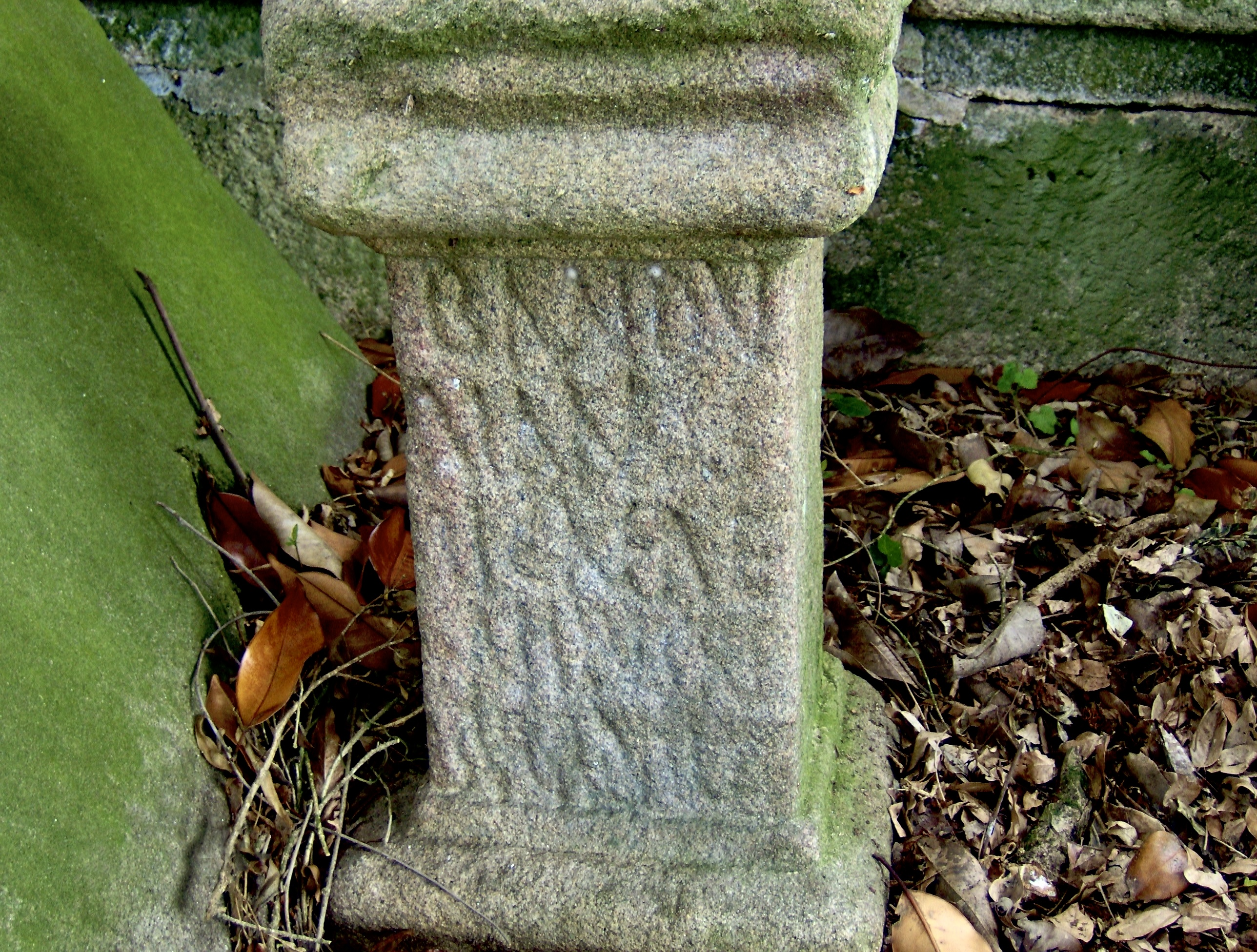 Fotografiada en 2007 en el lugar original, en el patio de un pazo. A la izquierda hay una losa que estaba encima del ara protegiéndola y haciendo de mesa en un jardín. Eiras, San Amaro, provincia de Ourense.